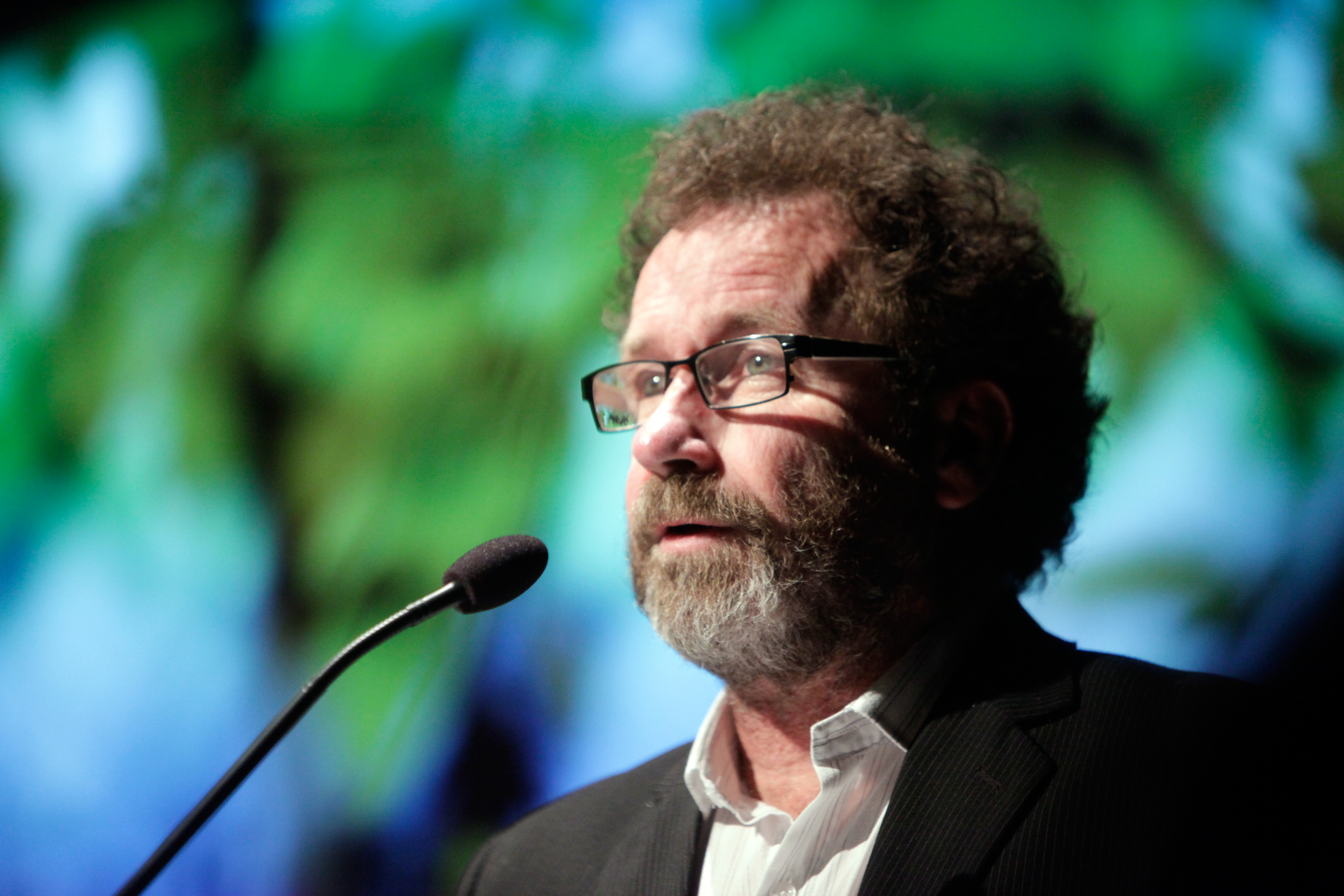 Per Petterson vinnare av Nordiska rådets litteraturpris 2009 vid utdelningen i Stockholm under Nordiska rådets session.